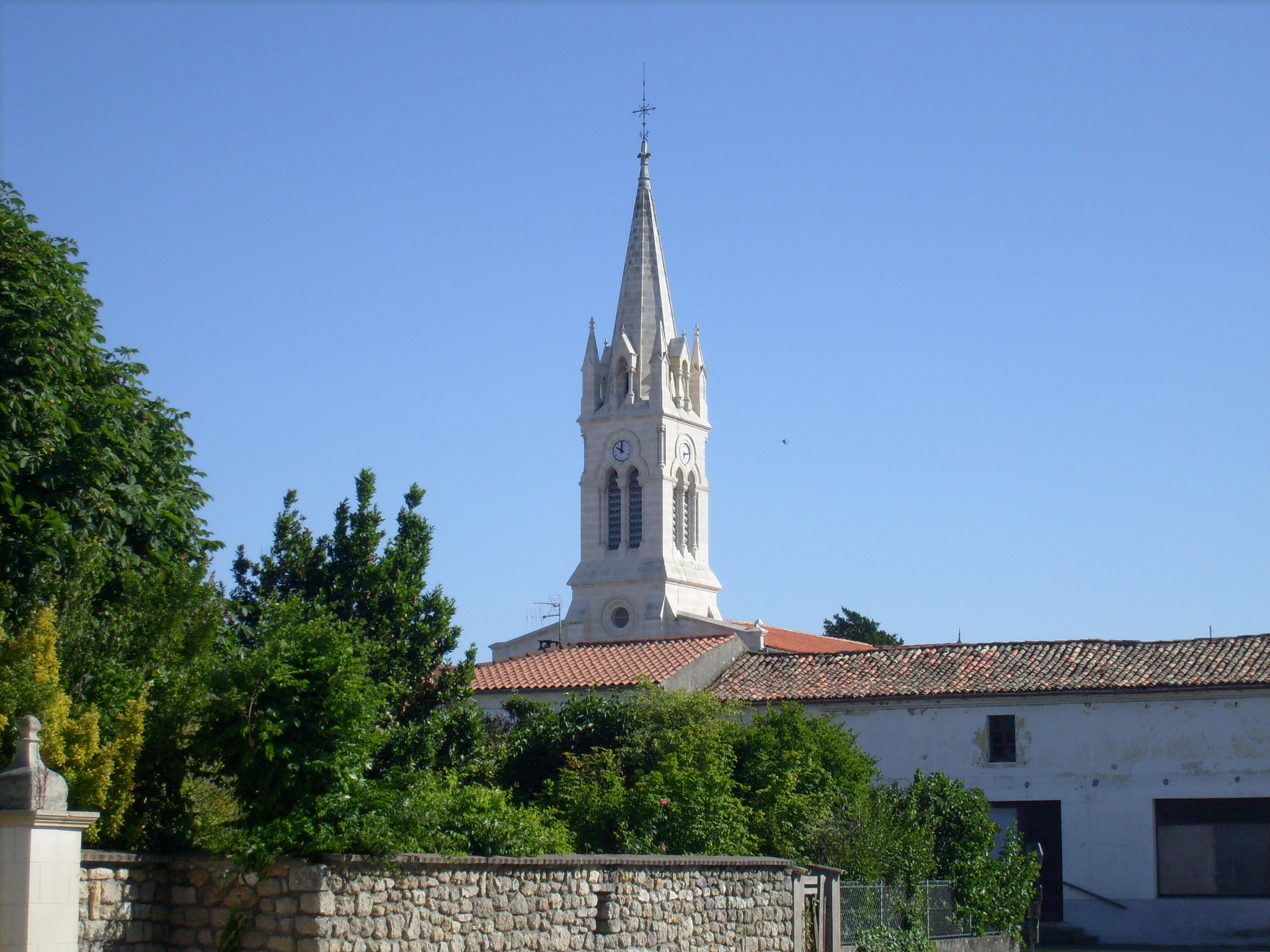 Le village de Semussac (Charente-Maritime)